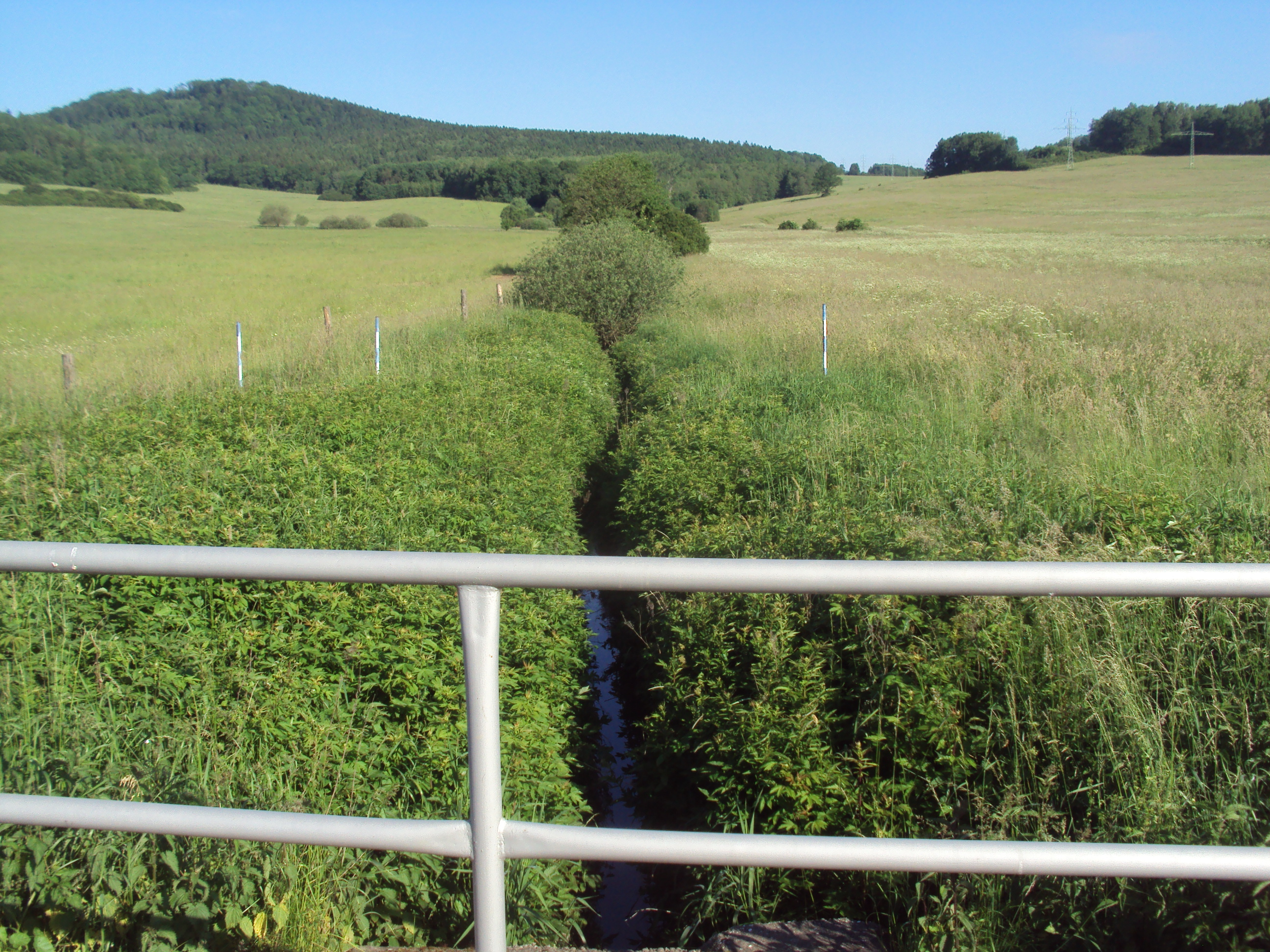 Stružnický potok po protečení soustavou Cihelenských rybníků, zde podtékající silnici z Horní Libchavy do Stružnice, je to katastr Stružnice